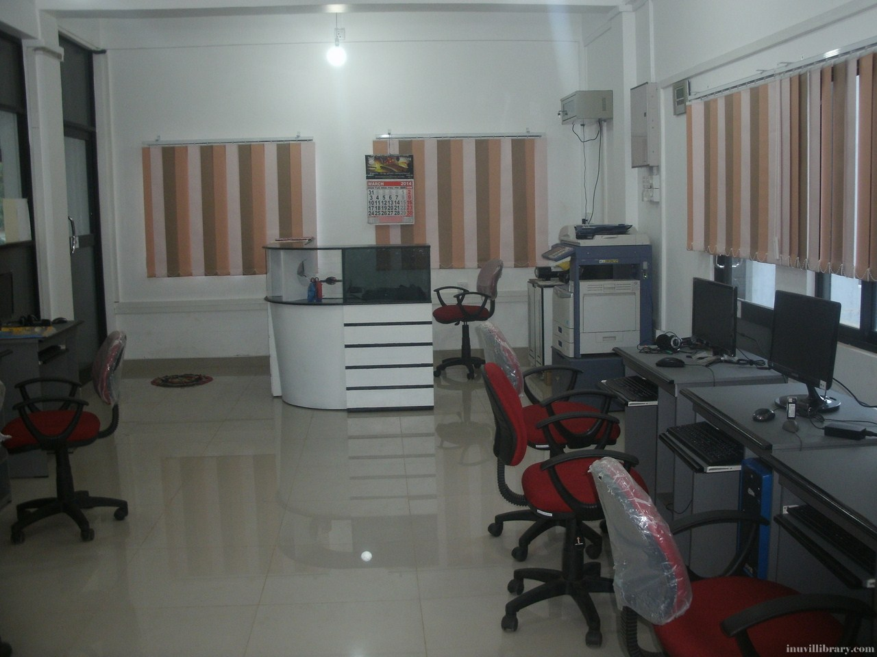 தகவல் தொழில்நுட்ப மையம்